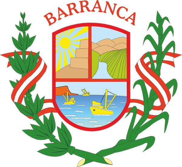 Escudo de la Provincia de Barranca